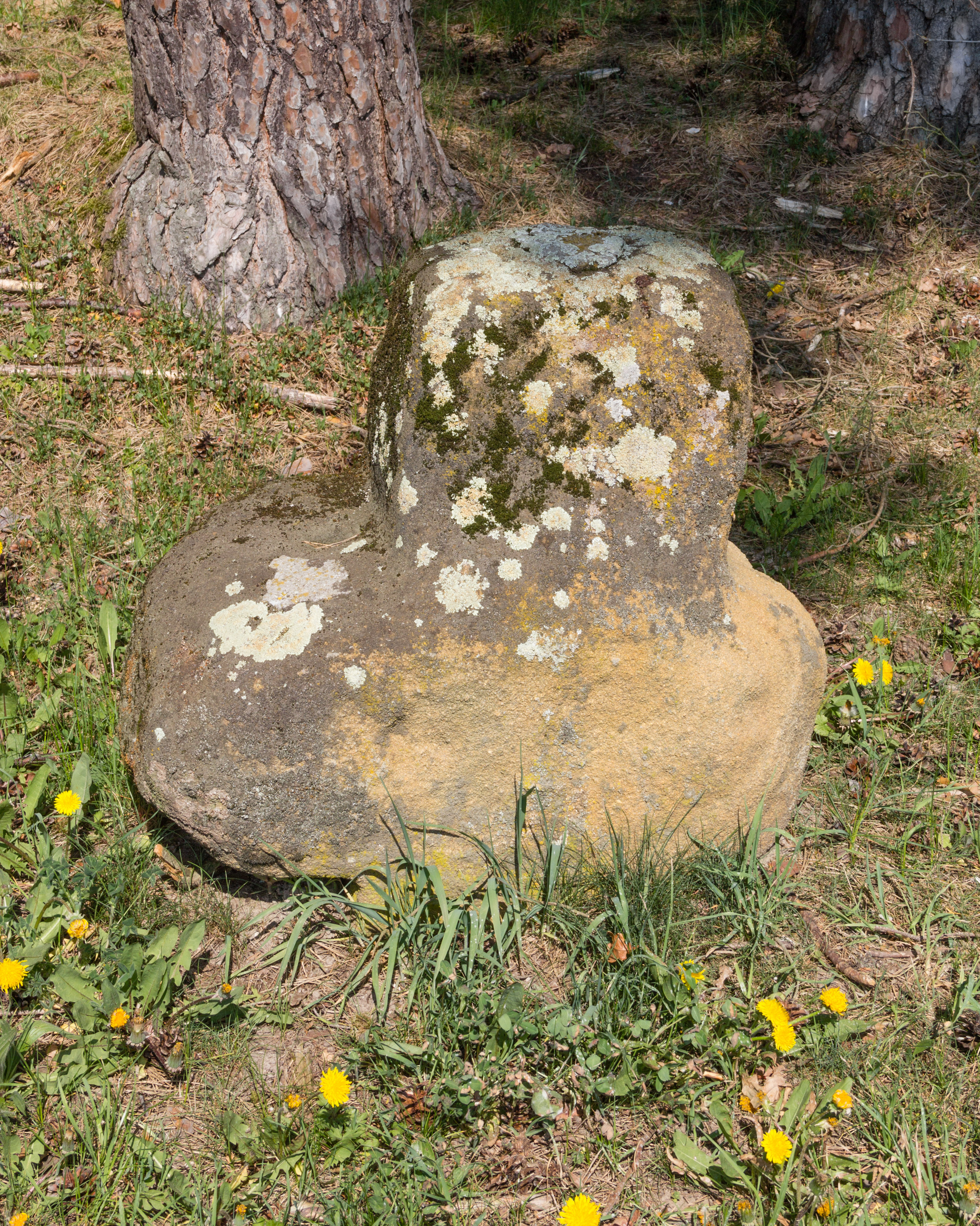 Steinkreuze, Lauf an der Pegnitz, Simmonshofen am Höllweiher, Kreuz 1, Sicht von vorne